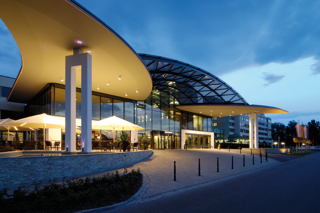 Johannesbad Eingang